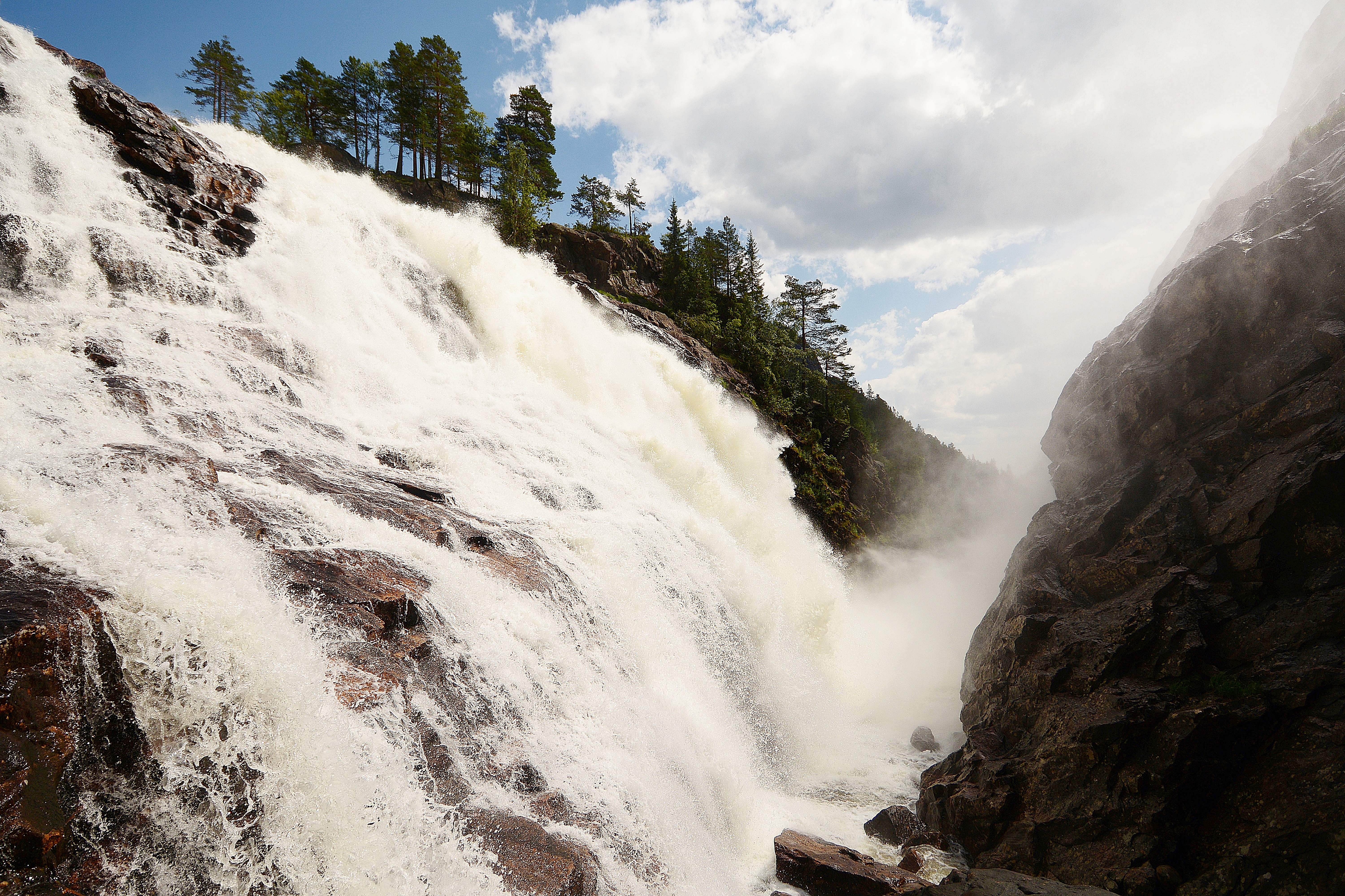 Rjukanfossen i Tovdalselva i Tovdal i Åmli kommune i Aust-Agder i Norge. Fotograf: Geir Daasvatn